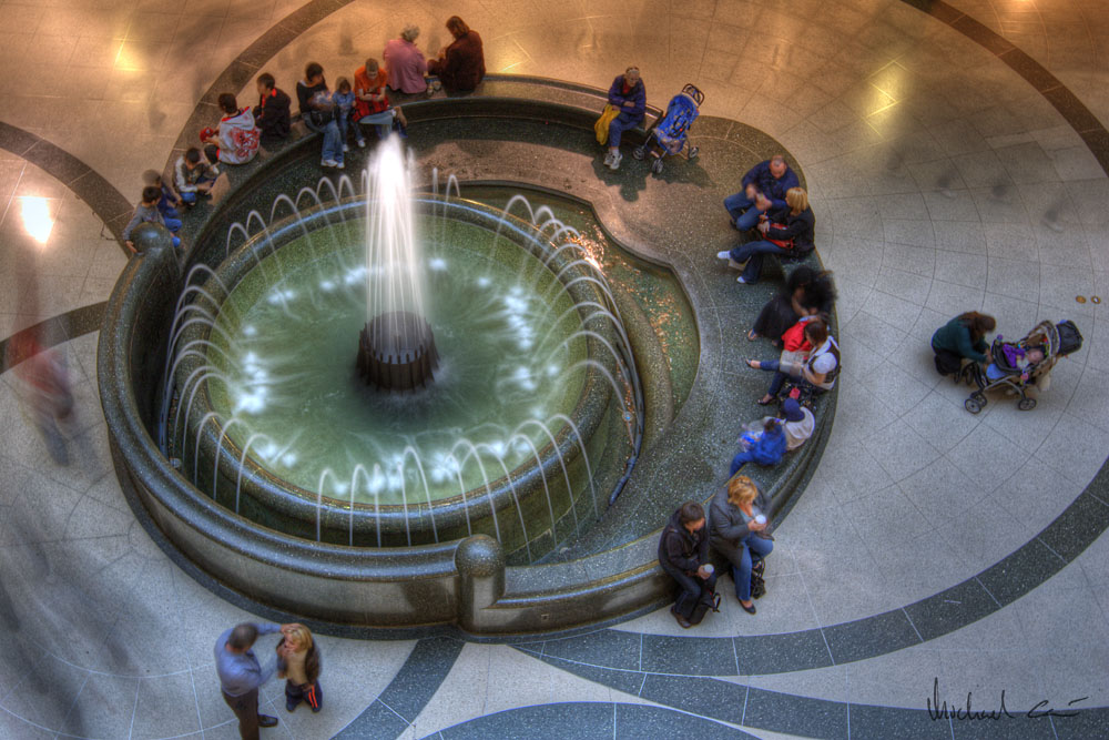 Inside Eaton Centre in Toronto.